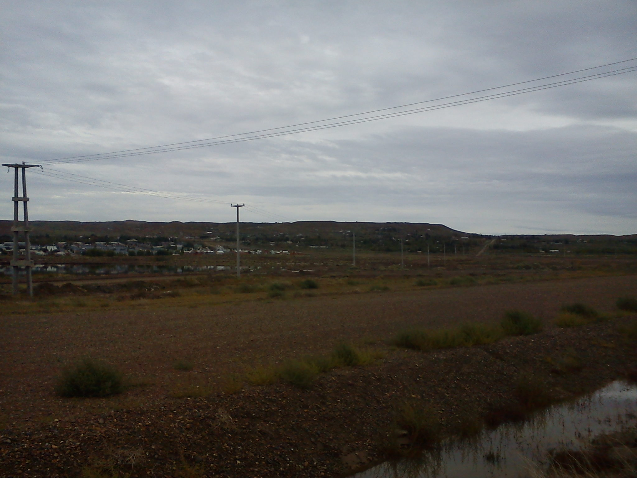 Vista al hermoso cerro que protege la ciudad